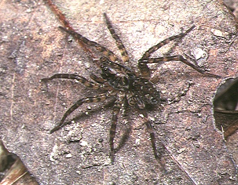 male Arctosa laminata from Okinawa.